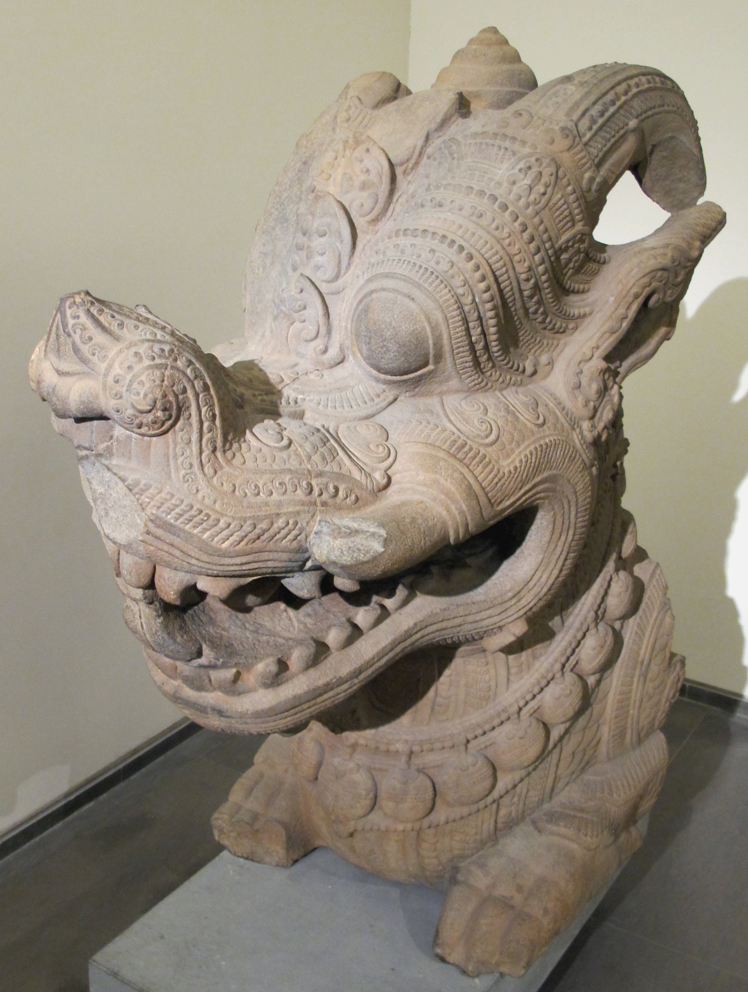 Vietnam, dragone da thap mam, stile di thap mam, 1190-1210 ca.